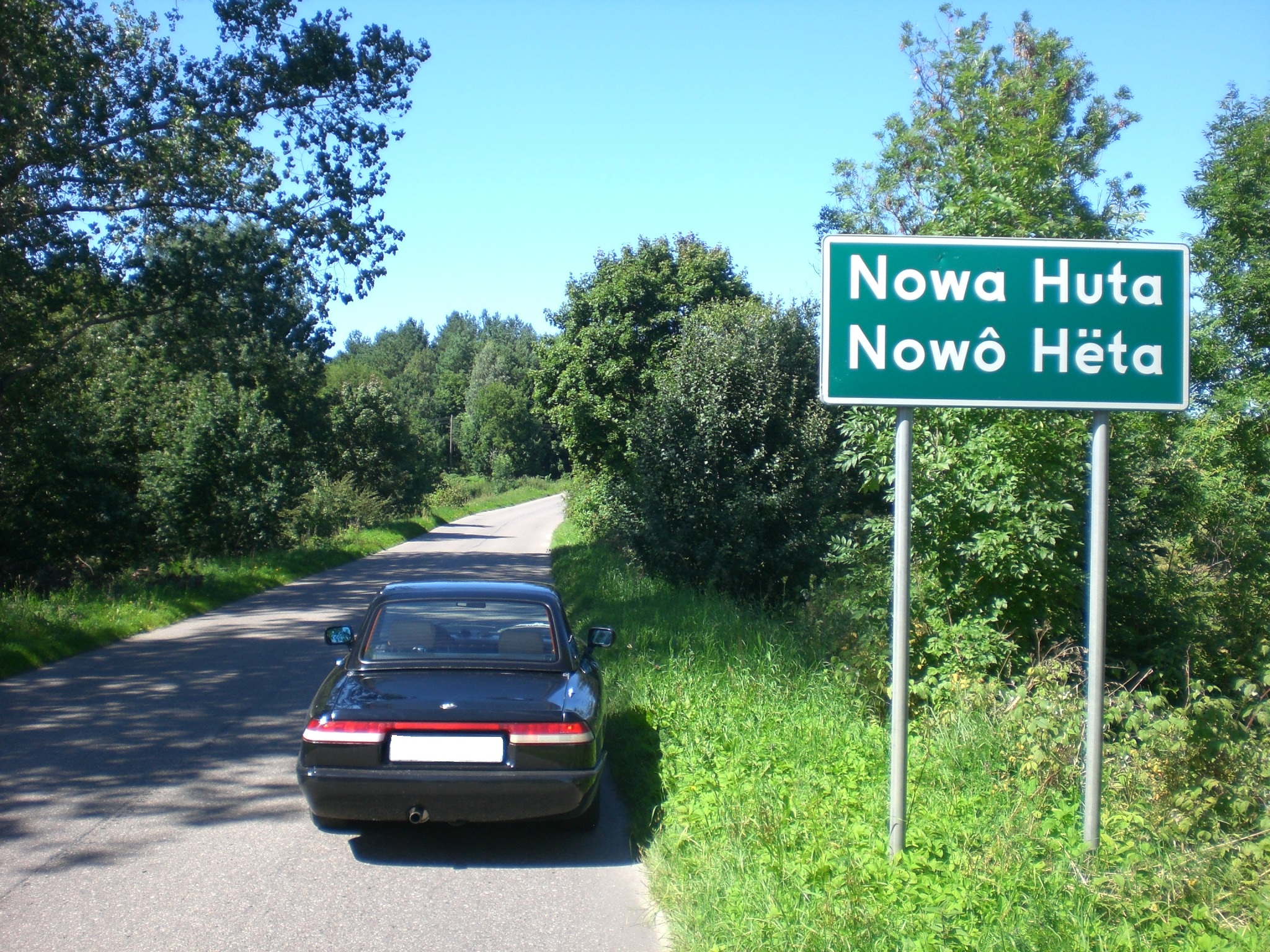 Nowa Huta